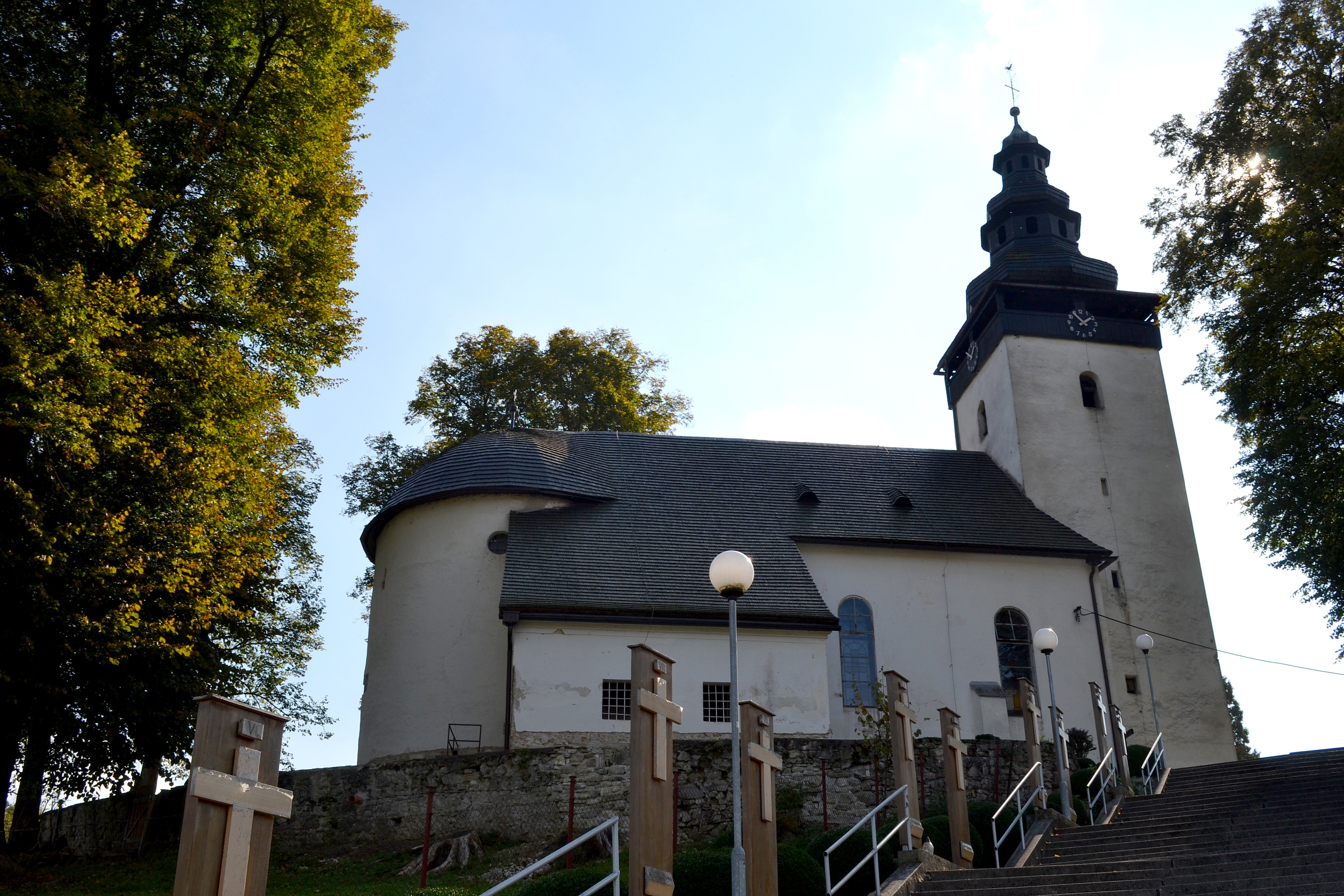 Domaniža (okr. Považská Bystrica), Kostol svätého Mikuláša; celkový pohľad